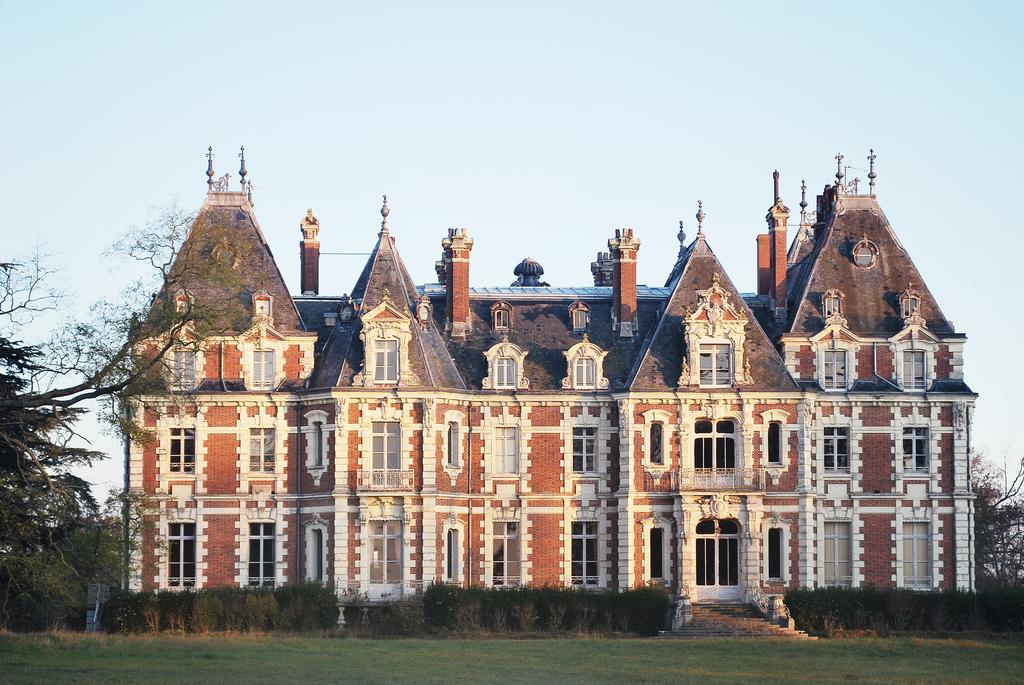 Château de la Jumellière (Chemillé-en-Anjou, Maine-et-Loire, France).